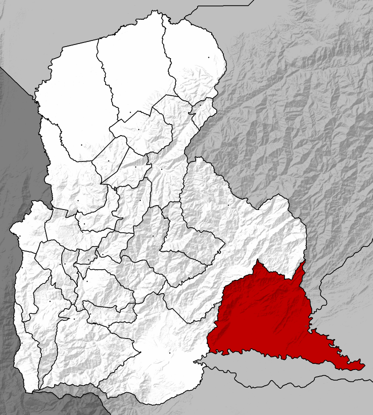 Municipio Libertador - Táchira